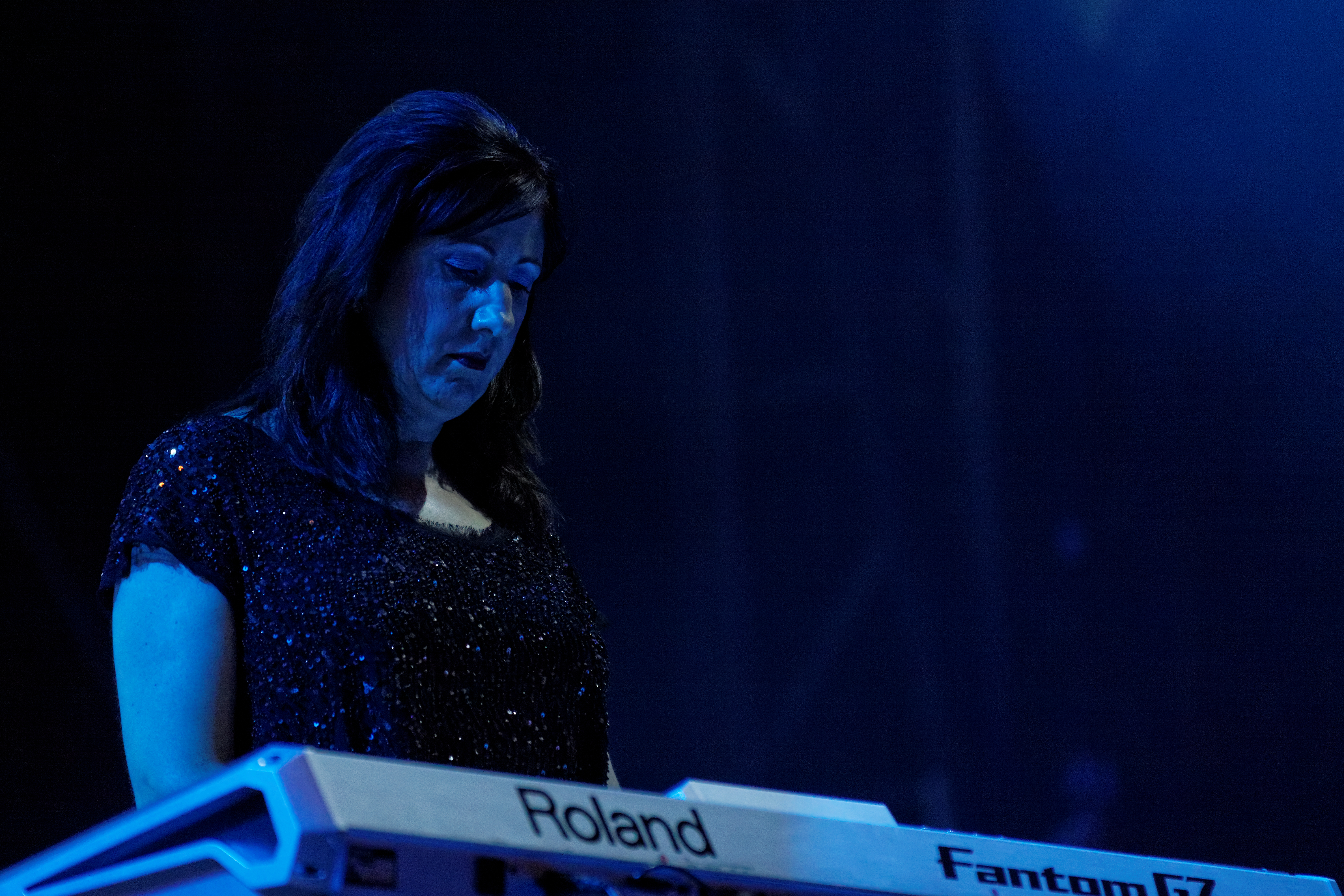 New Order en concert sur la grande scène lors de la fête de l'Humanité 2012.